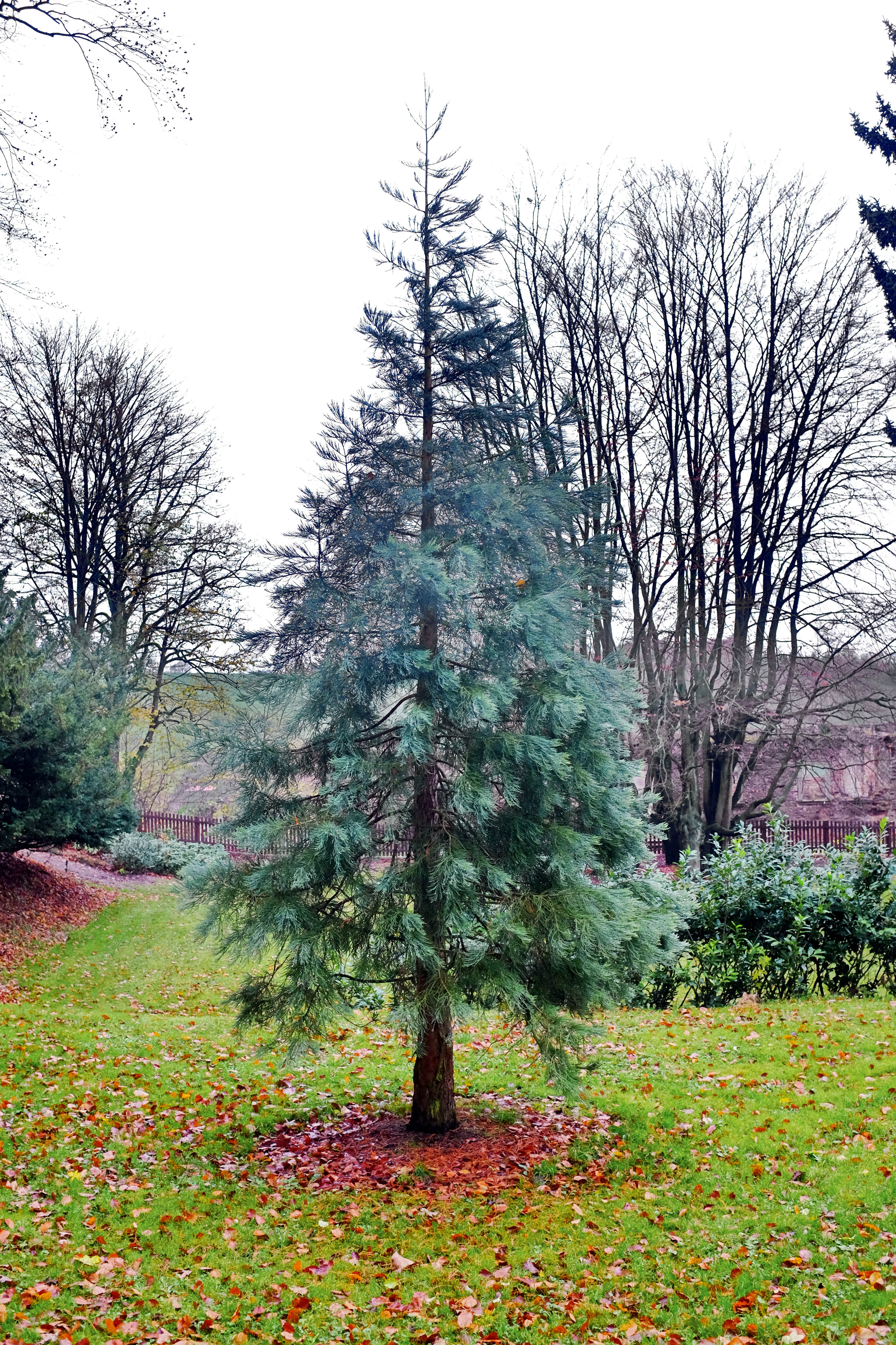 Kostelní Bříza, zámecký park, nově vysazený strom - Sekvojovec obrovský - náhrada za památný strom, zasažený bleskem